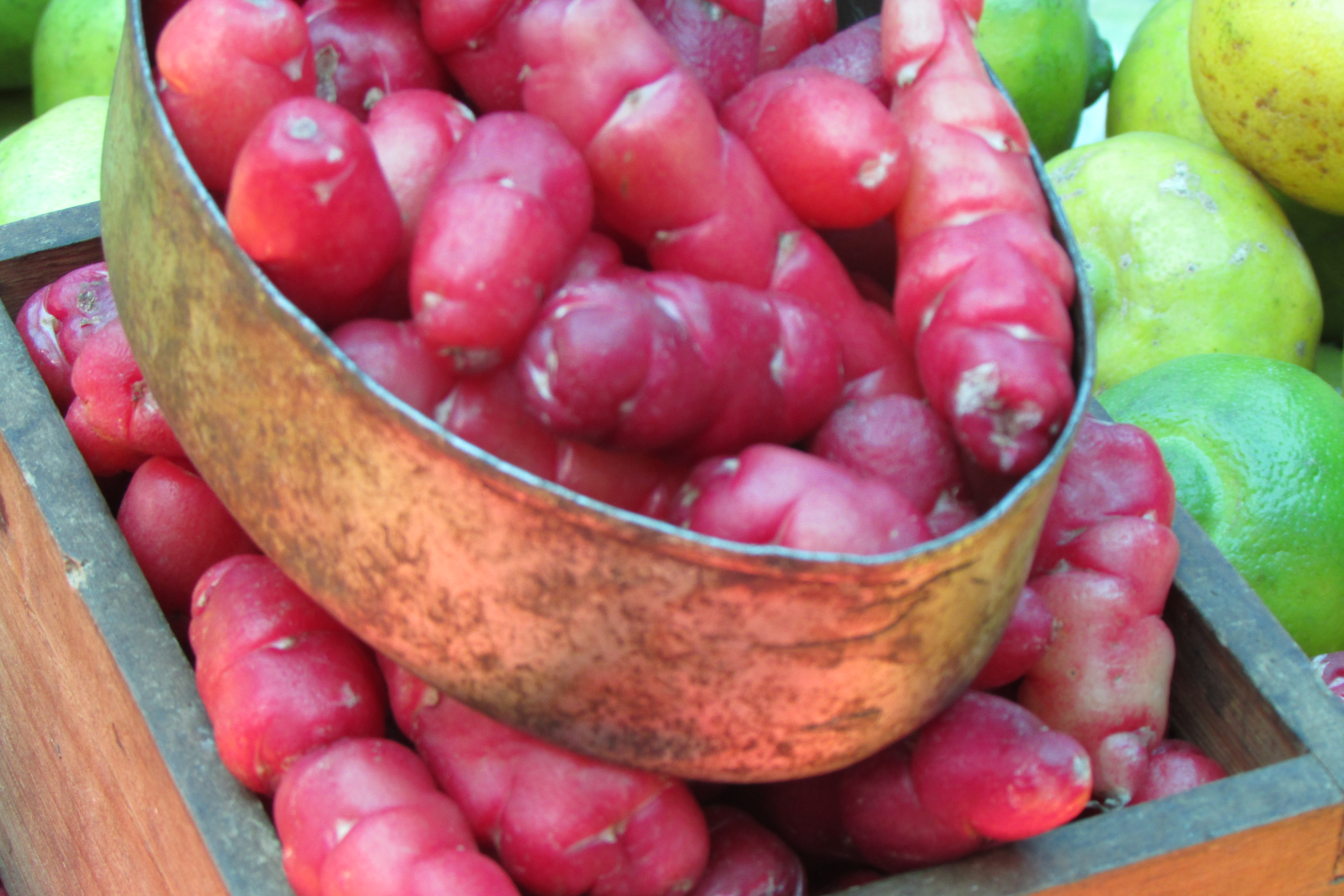 Variedad de papa dulce Yapatlachtli, originaria de Acaxochitlán, Hidalgo, México.